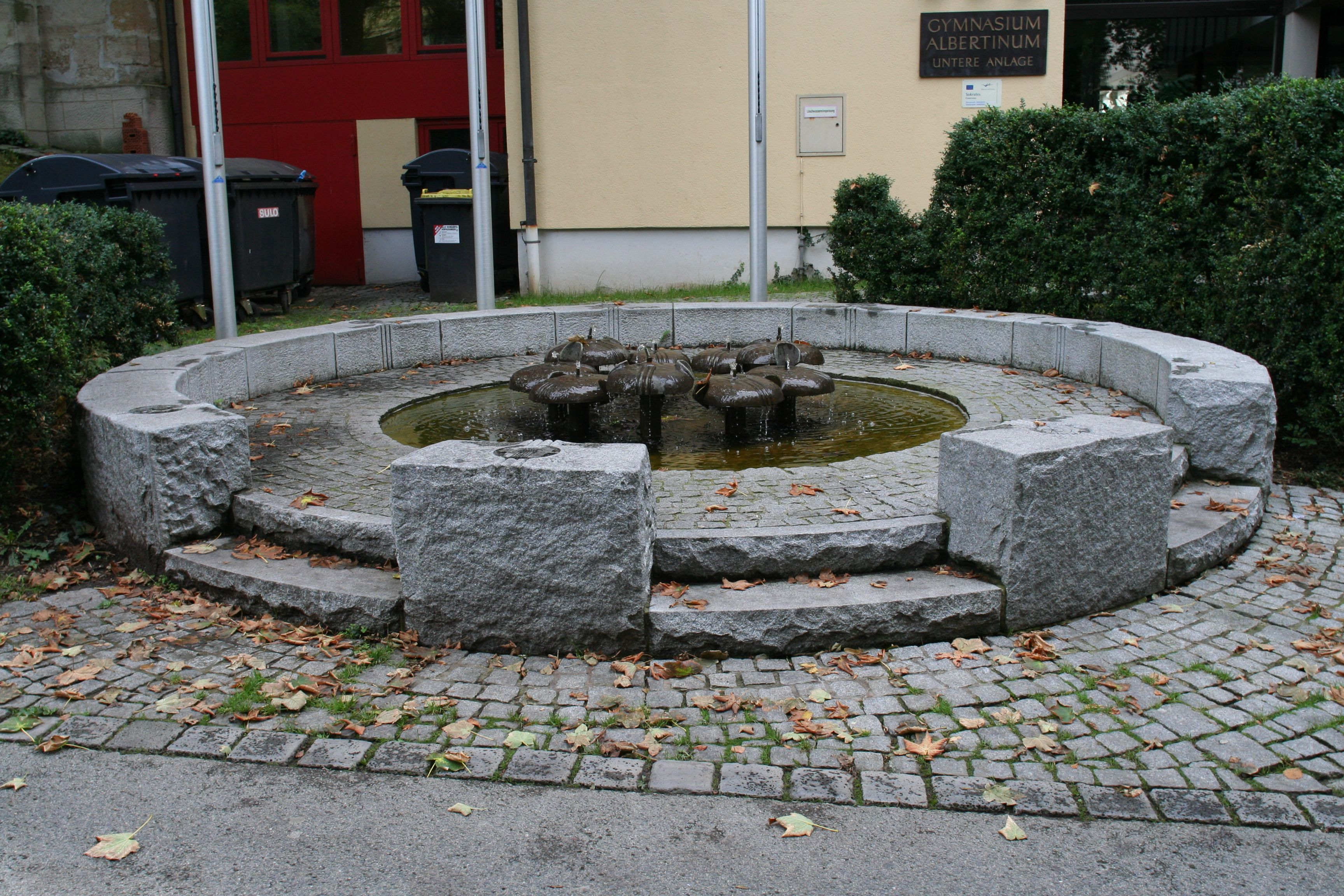 Brunnen in Unteren Anlage vor dem Gymn. Albertinum in Coburg